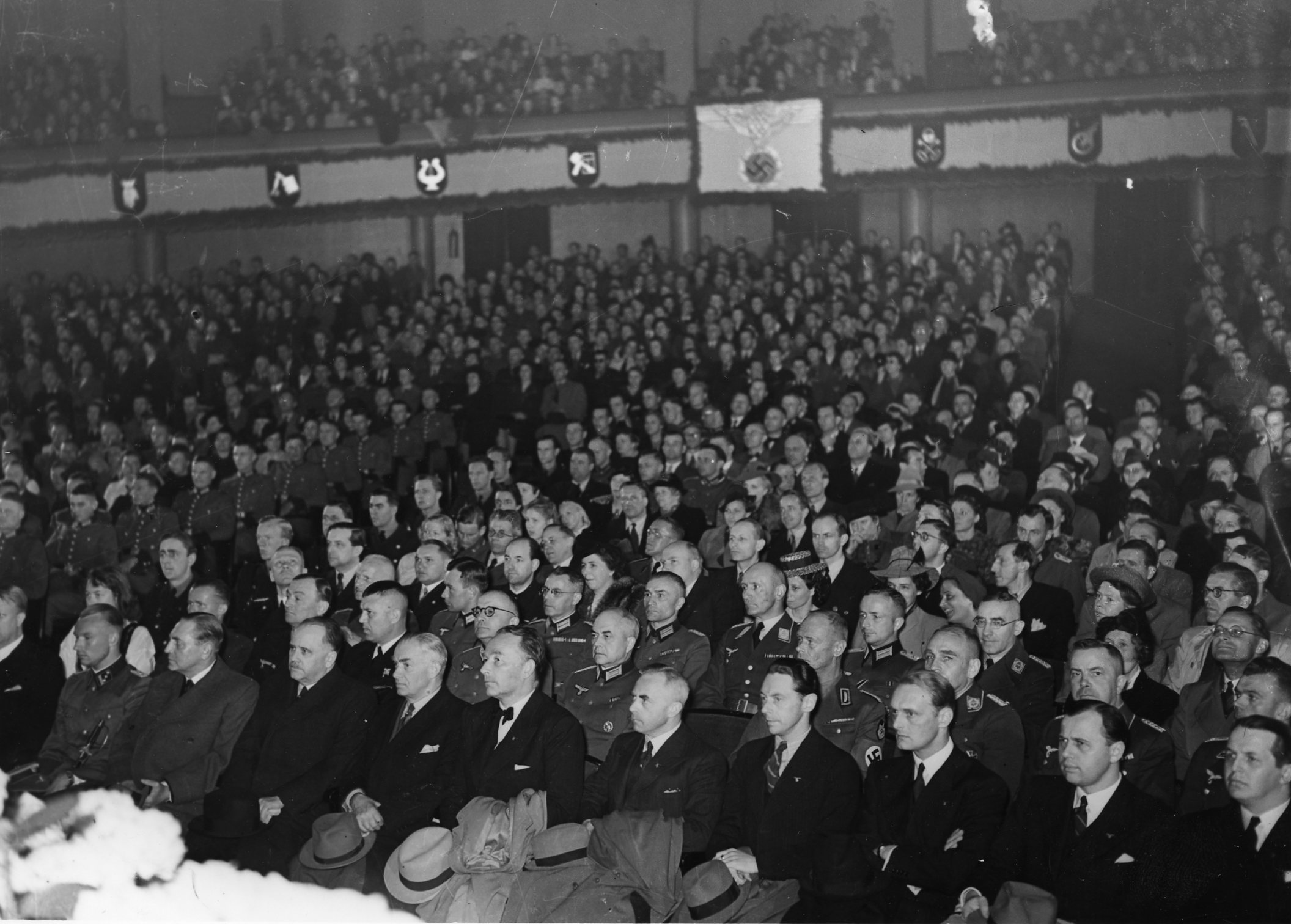 RA/PA- 1209/Ue 90/ img015